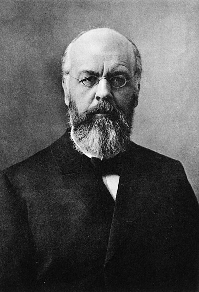 Emil Schürer (1844-1910), deutscher evangelischer Theologe